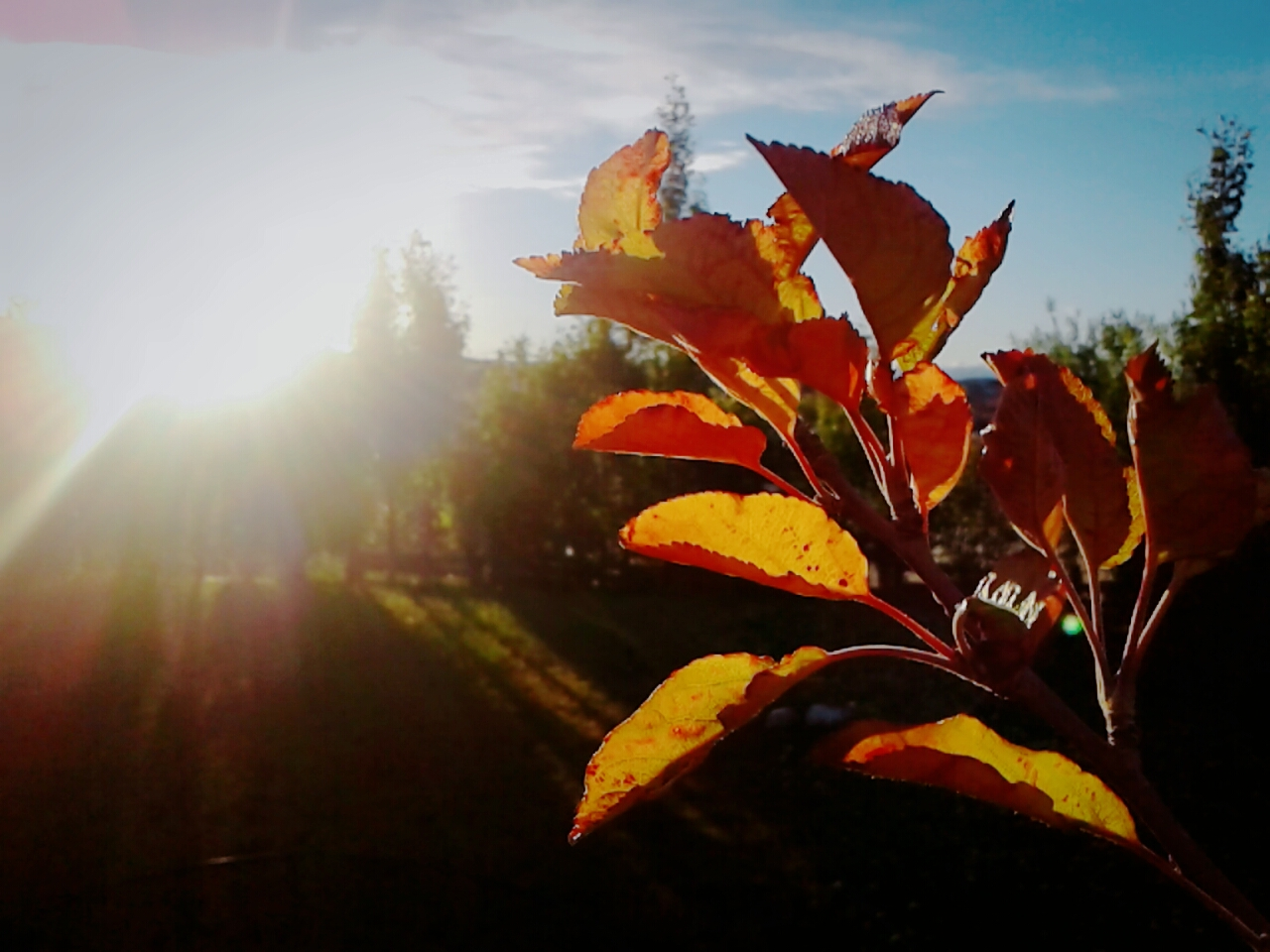 Tomado en el Parque Belgrano.Parque Belgrano